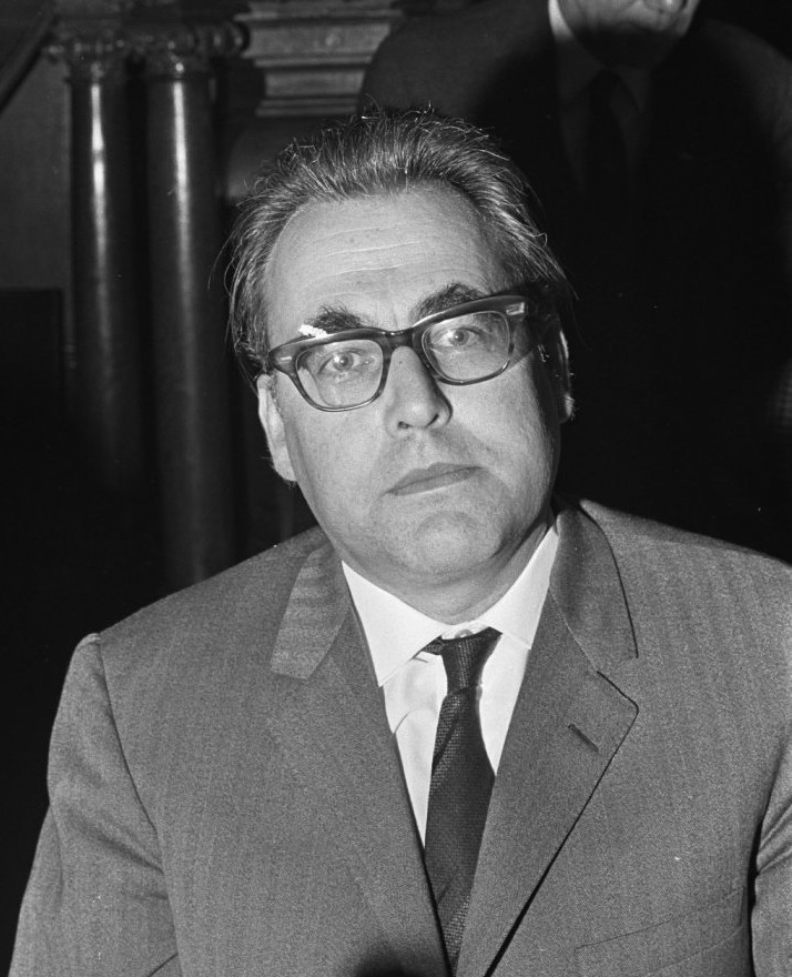 Rusland-forum in Aula Universiteit Amsterdam. Nummer 8 Professor dr. J. Bezemer